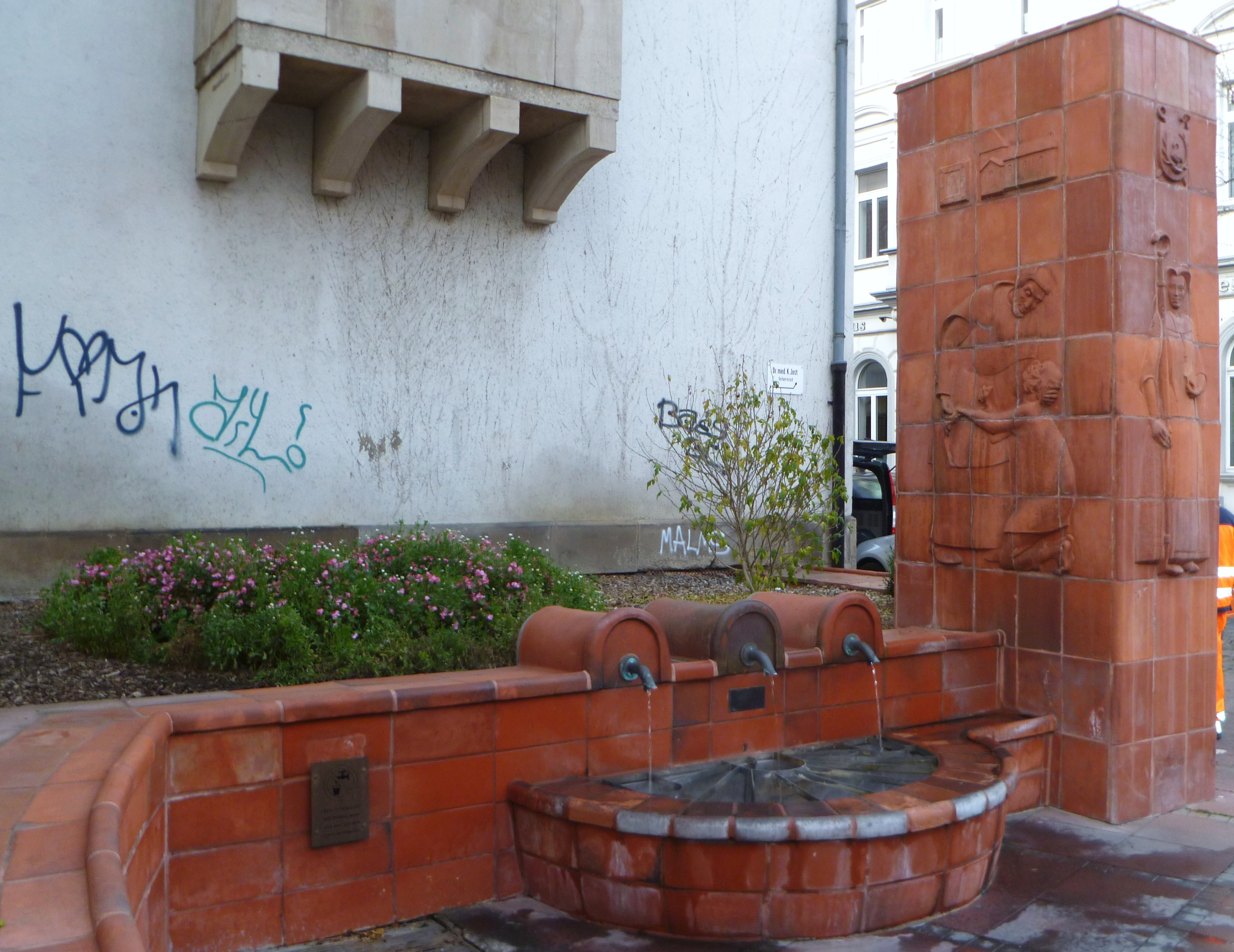 restaurierter Marktbrunnen Aachen-Burtscheid 2011